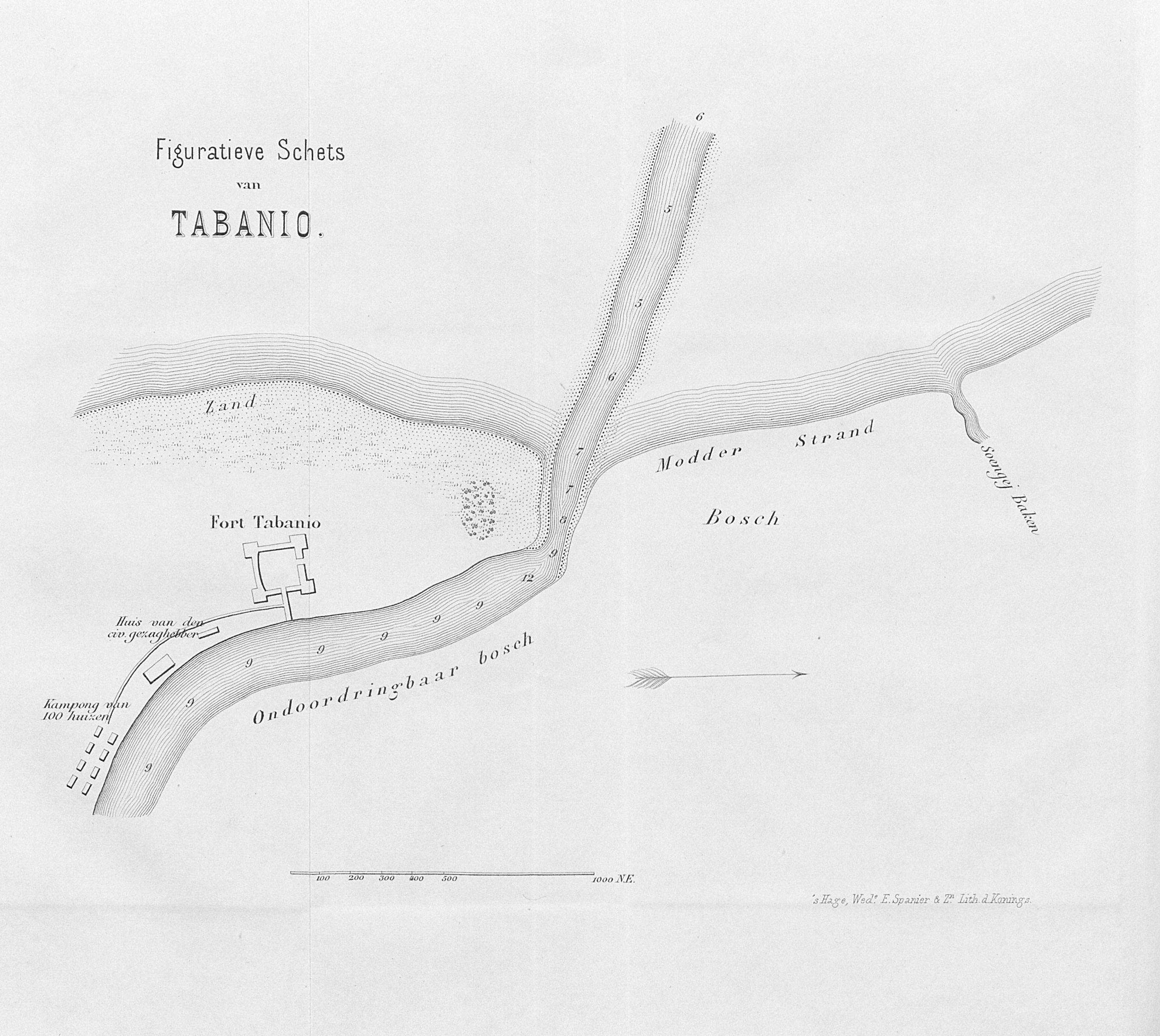 Figuratieve Schets van Tabanio